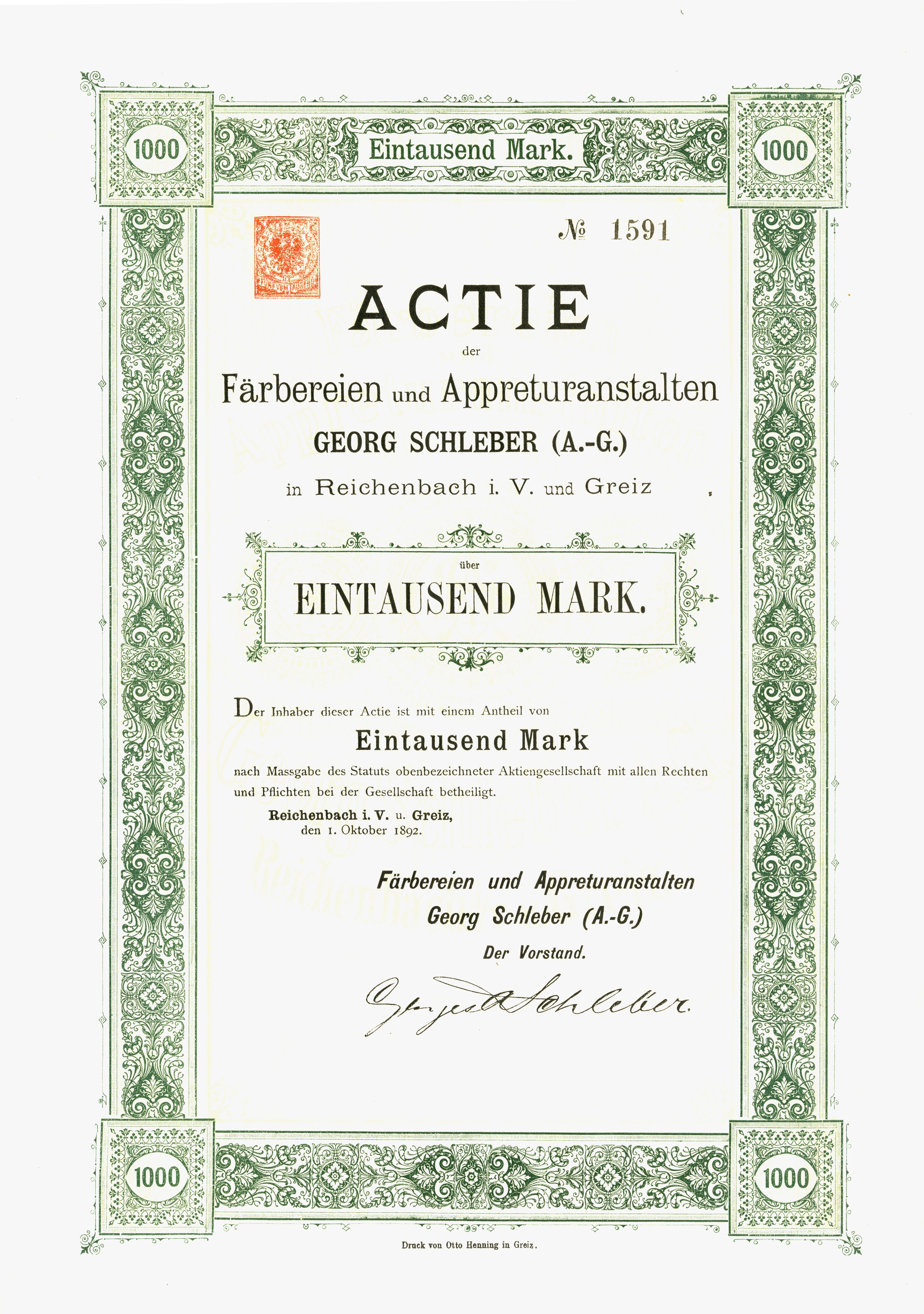 Aktie der Georg Schleber AG Faerbereien und Appreturanstalten in Reichenbach i. V. und Greiz